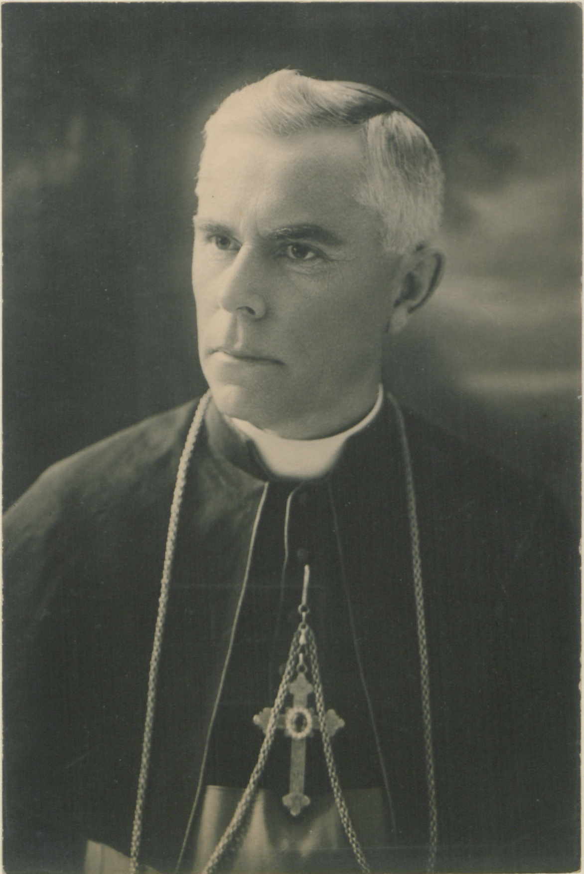 Monseigneur F.X. Brunet, Eveque de Mont Laurier. Head-and-shoulders studio portrait.